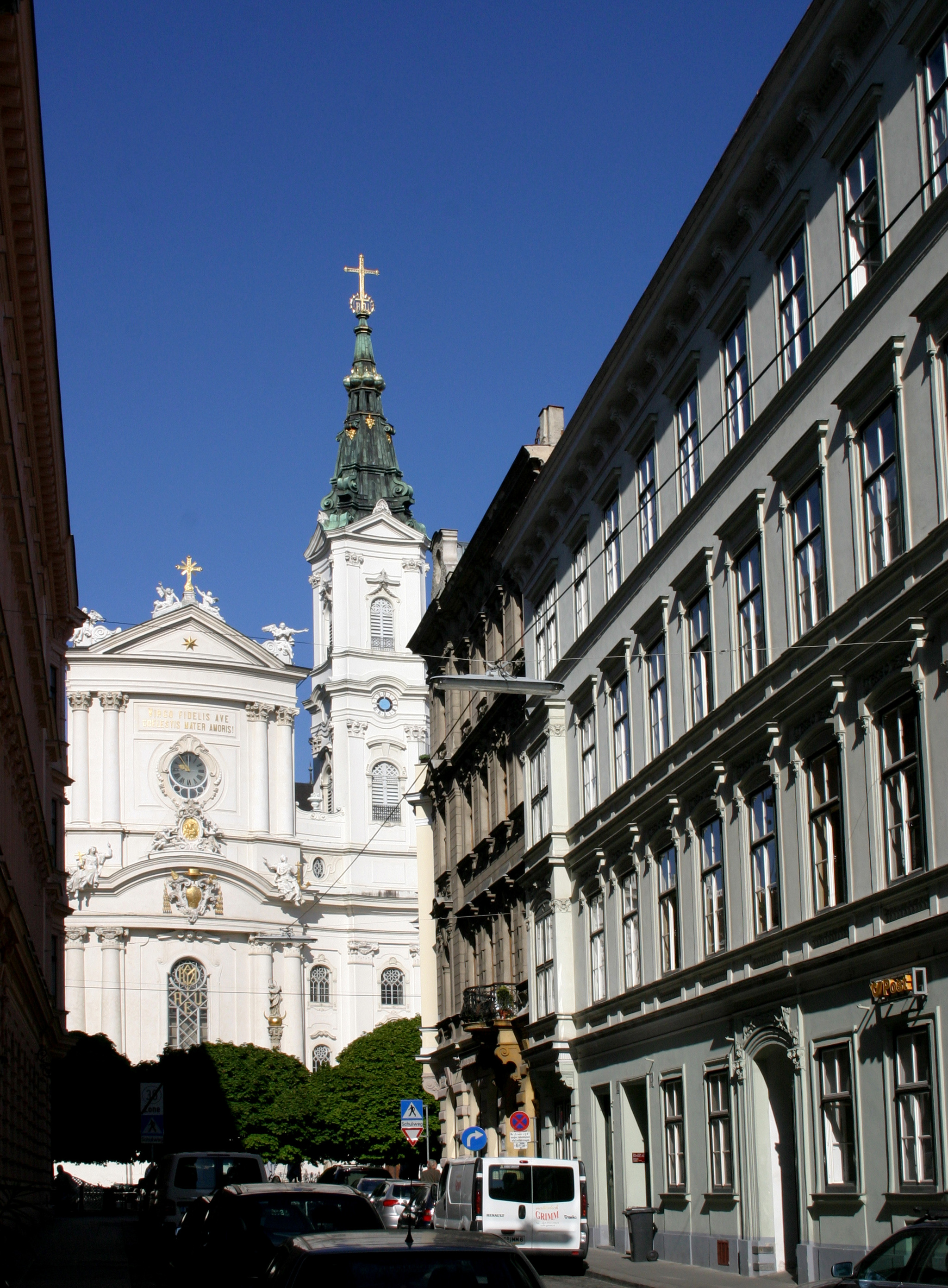 Piaristenkirche Wien